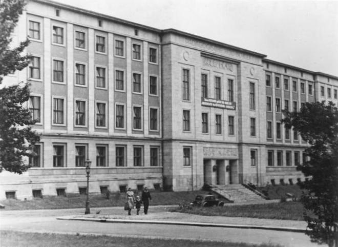 Dresden, Pädagogische Hochschule Zentralbild Höhne-Pohl 19.9.1953 Neue Ausbildungsstätte für künftige Erzieher Mitte September 1953 wurde das Pädagogische Institut für Geographie- und Geschichtslehrer in Dresden eröffnet. UBz: Blick auf das Gebäude, in dem bisher das Institut für Lehrerbildung untergebracht war.